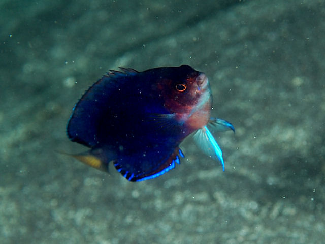 チャイロヤッコ Centropyge fisheri